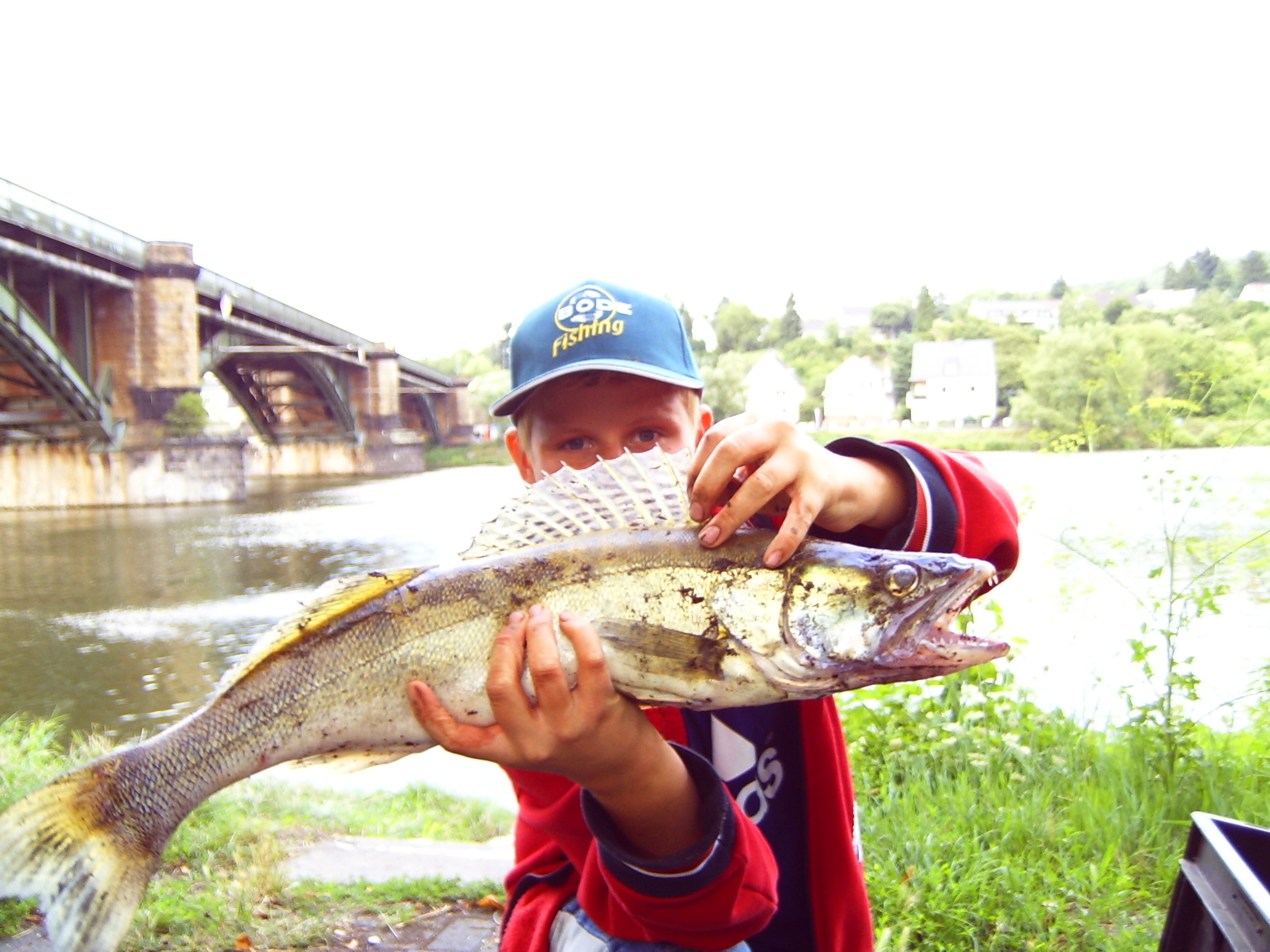 Ein Zander